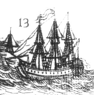 Линейный кораль "Святая Екатерина" (с гравюры Пикарта, 1716)